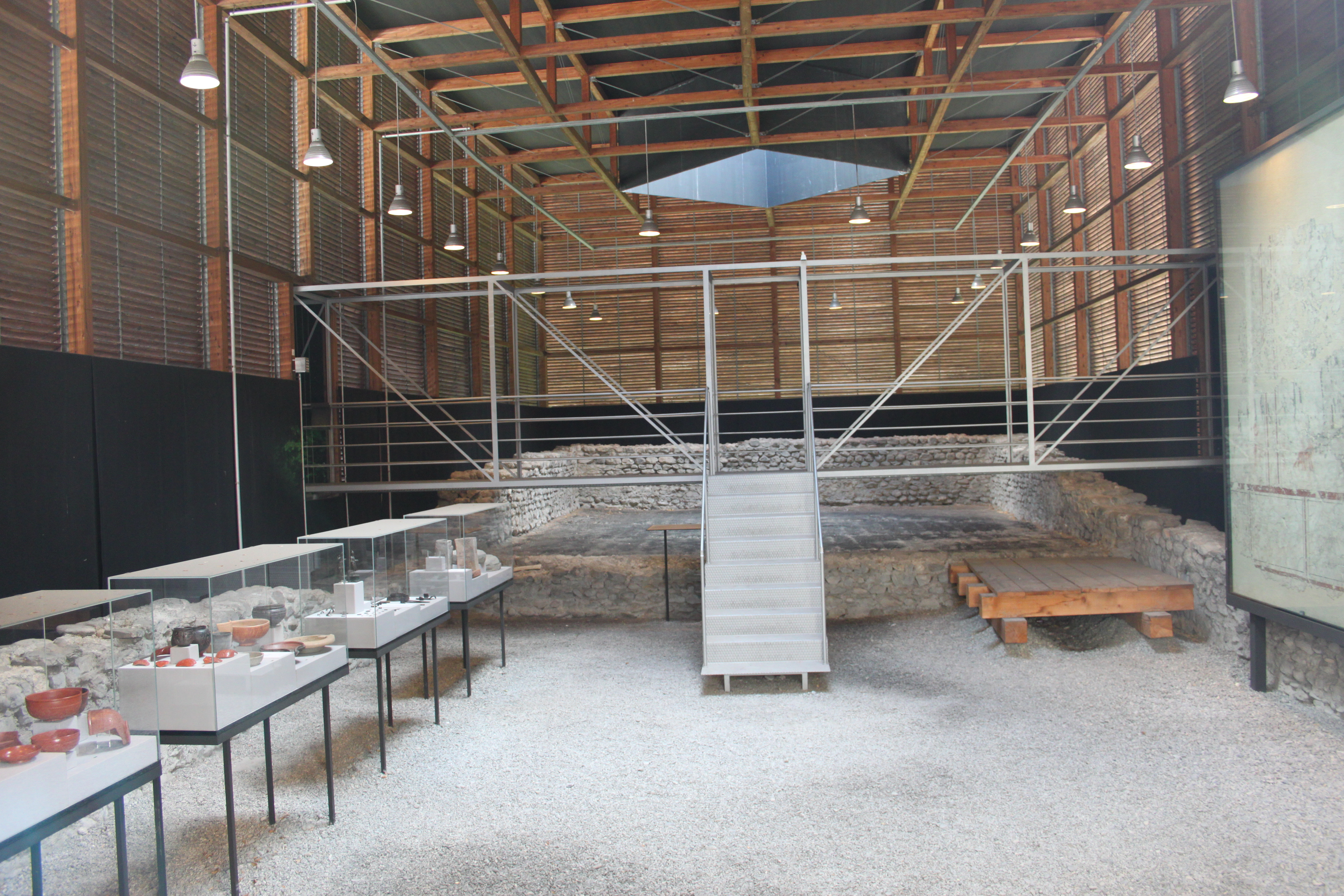 römischer Vicus Chur